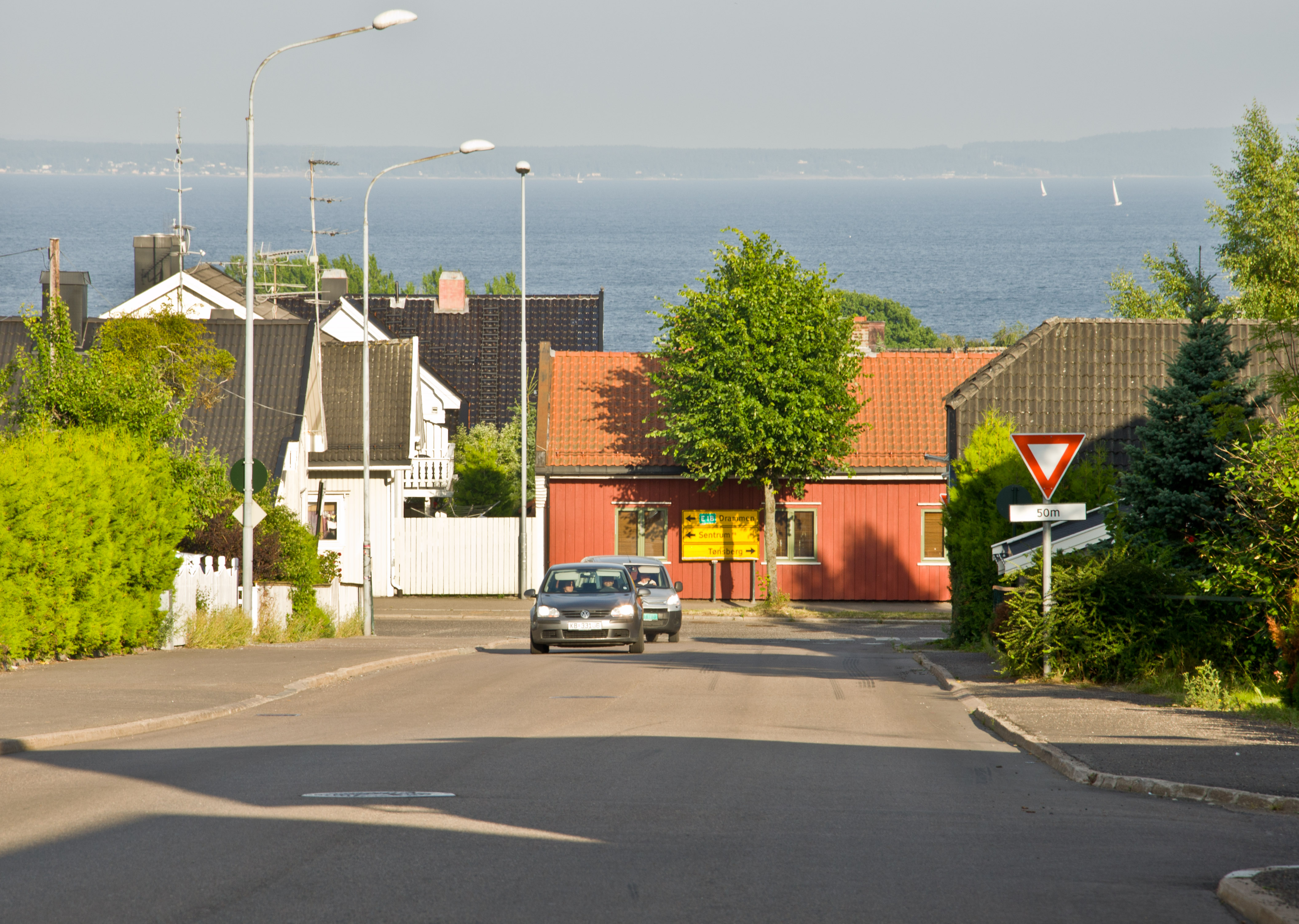 Fylkesvei 707 Grønligata, Horten